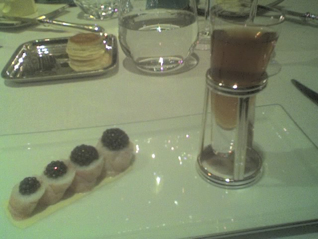 Caviar osciètre d’Iran, langoustines rafraîchies, nage réduite, bouillon parfumé - specialité d'Alain Ducasse (Plaza Athénée)